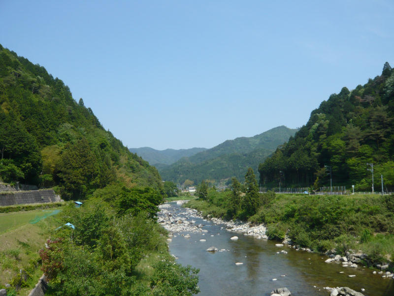 東白川村五加地区